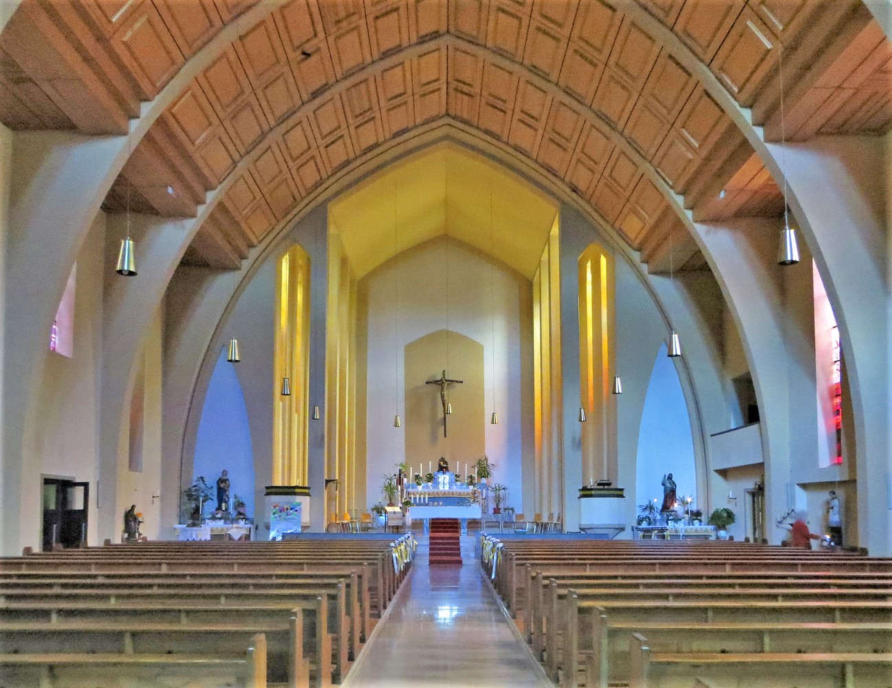 Blick ins Innere der kath. St. Marien-Kirche in Saabrücken-Herrensohr.